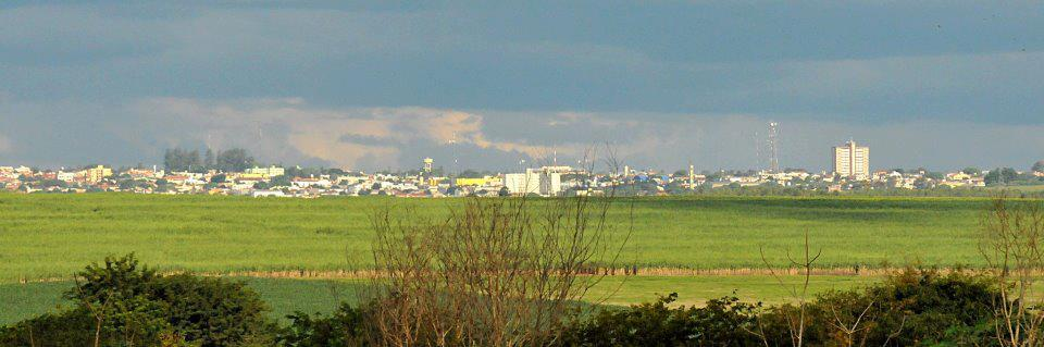 Panorâmica da cidade de Goioerê em contraste com a agricultura.